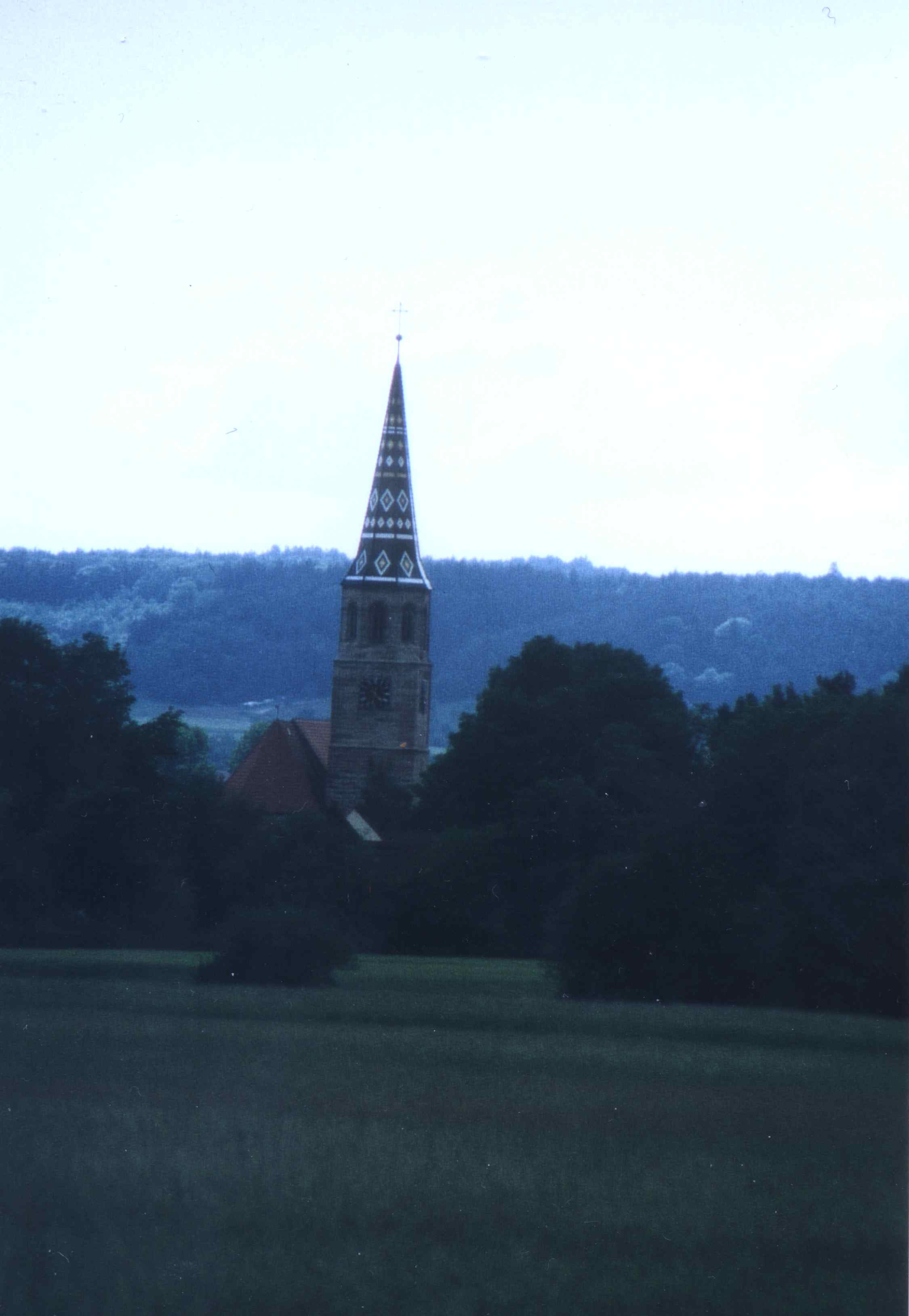 Aufnahme Kirchturm St. Vitus (Neunstetten) von Steinbach aus gesehen